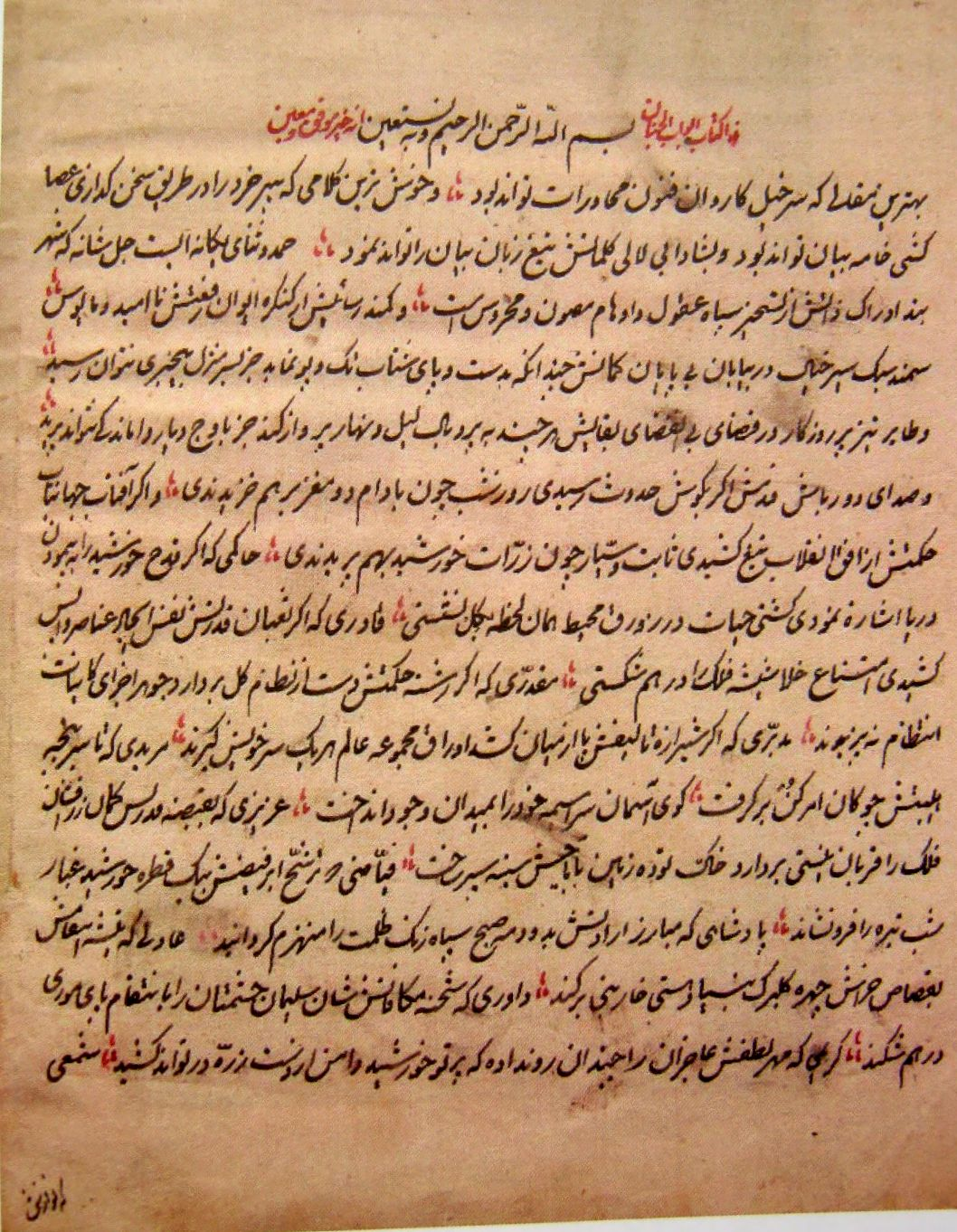 یک سند قدیمی مربوط به محرران بهار